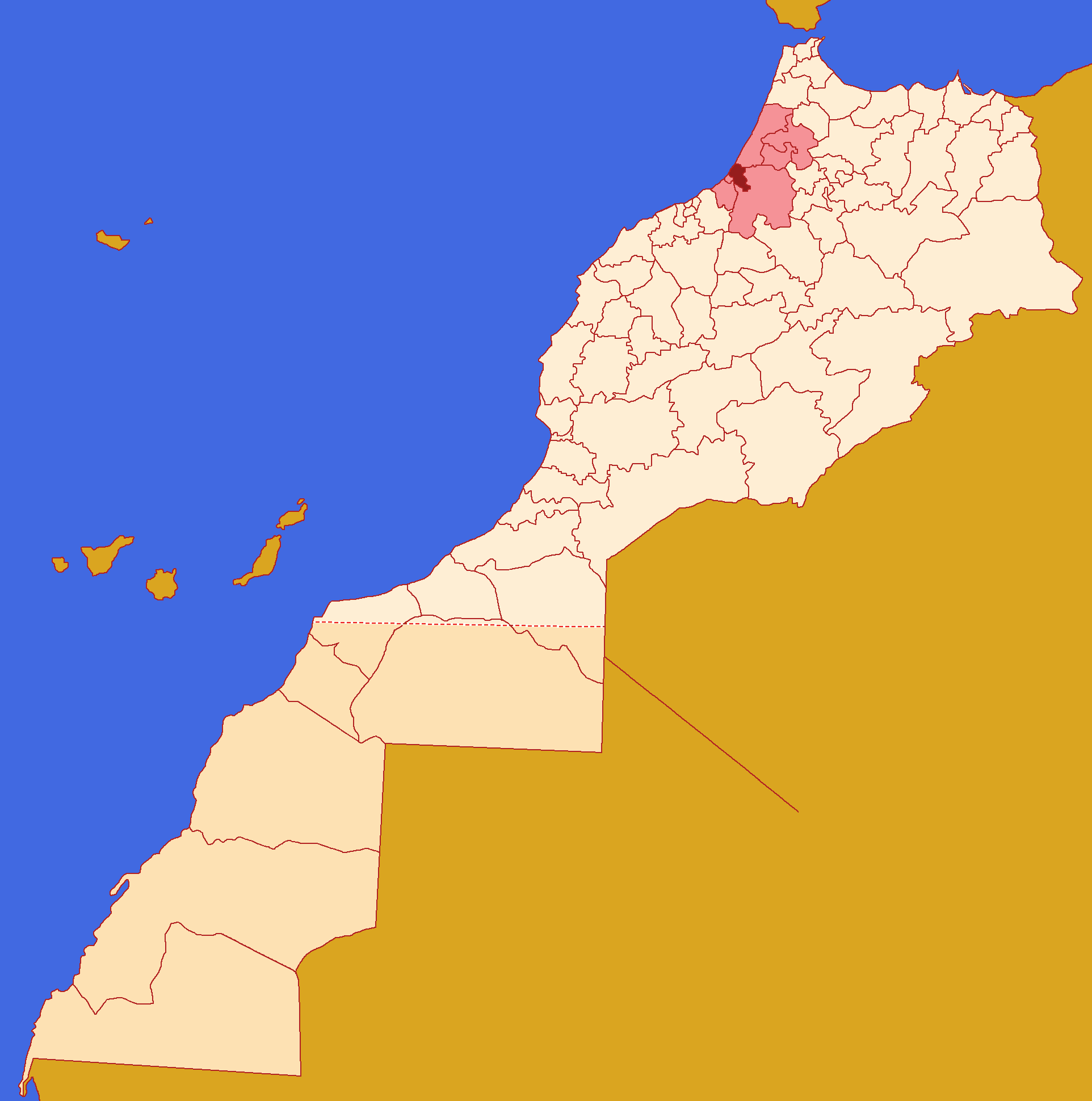 Localização da prefeitura, na região de Rabat-Salé-Kénitra, em Marrocos, conforme a reforma administrativa de 2015